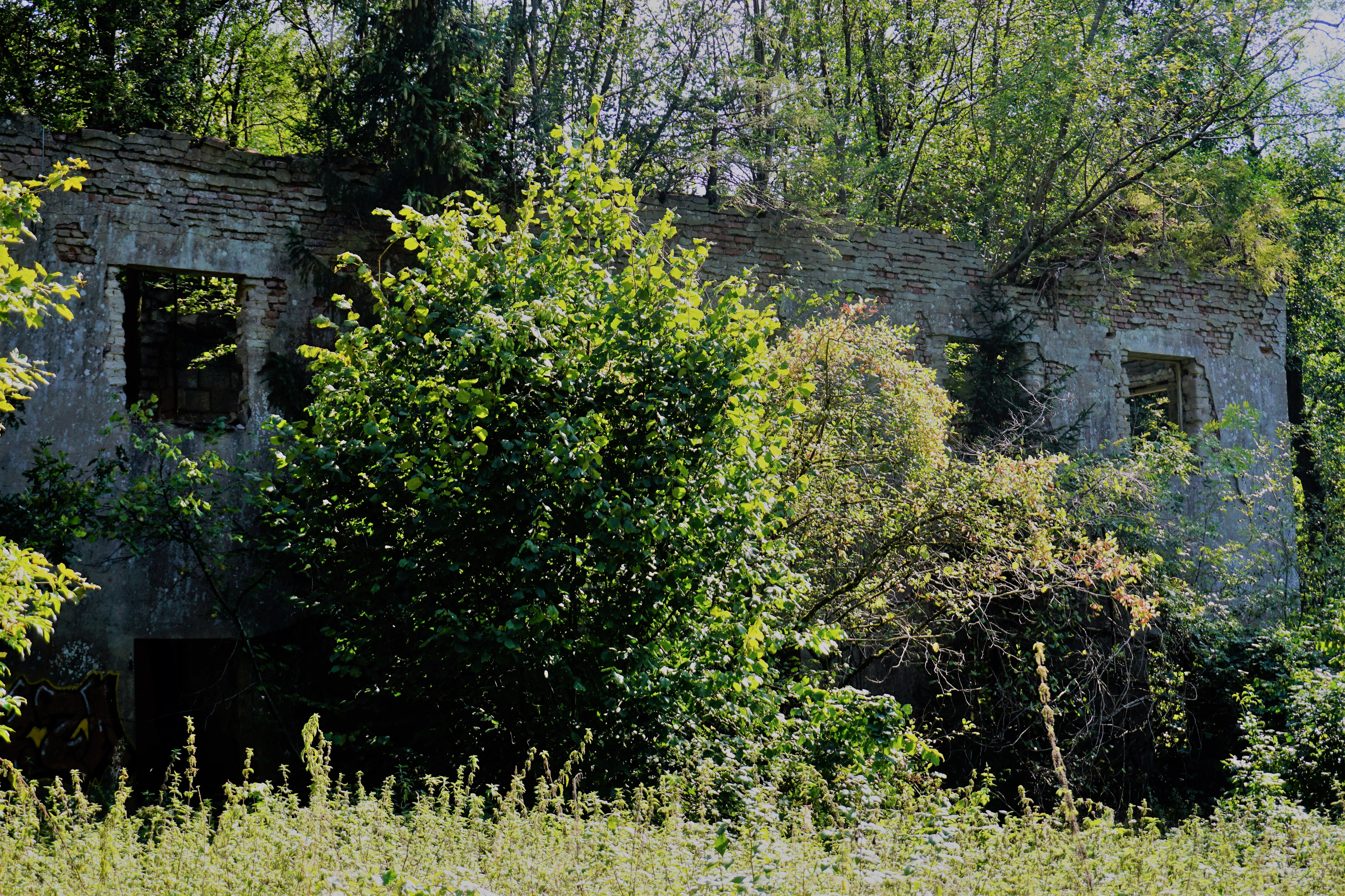 Autelbas. Restes du barrage de rétention dont l'eau servait autrefois de refroidisseur à l'usine sidérurgique de Steinfort. Ruine d'un bâtiment technique.